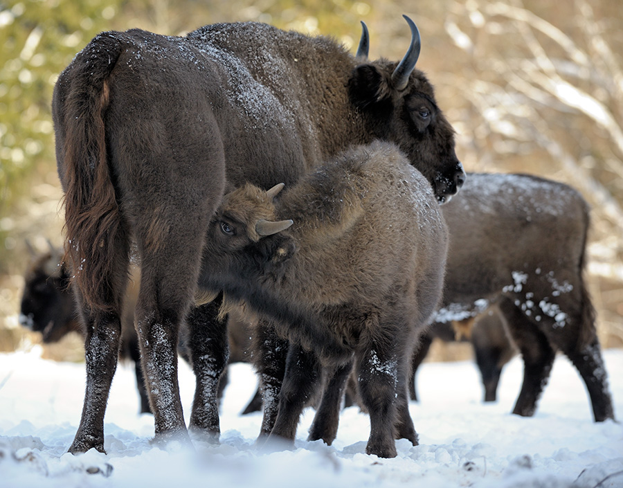 Зубры. Заповедник "Калужские засеки"